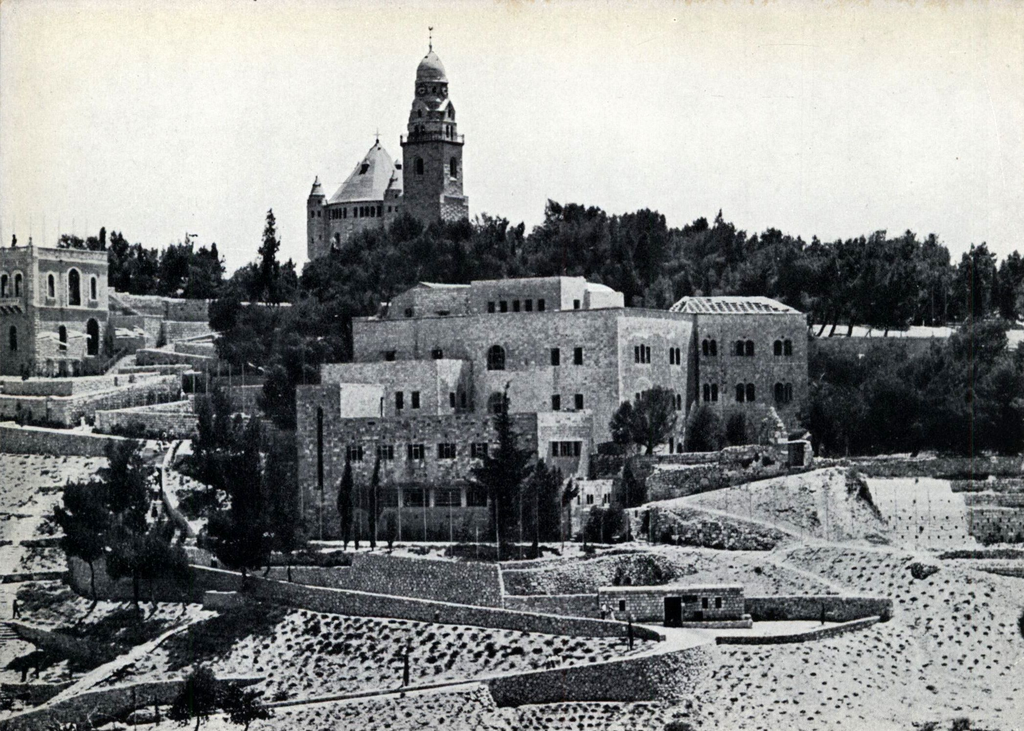 הר ציון. עבודות שיפורים נעשו בשנים 1954-1958. בין העבודות שבוצעו: תיקון גג כנסית דורמיציון שנפגע במלחמת השחרור, תקון העליה לקבר דוד, בנית מדרגות חדשות, וסלילת דרך לעליה להר.